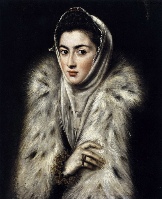 Sent 1570-tal, målningen kan vara ett porträtt av konstnärens gemål Jerónima de las Cuevas